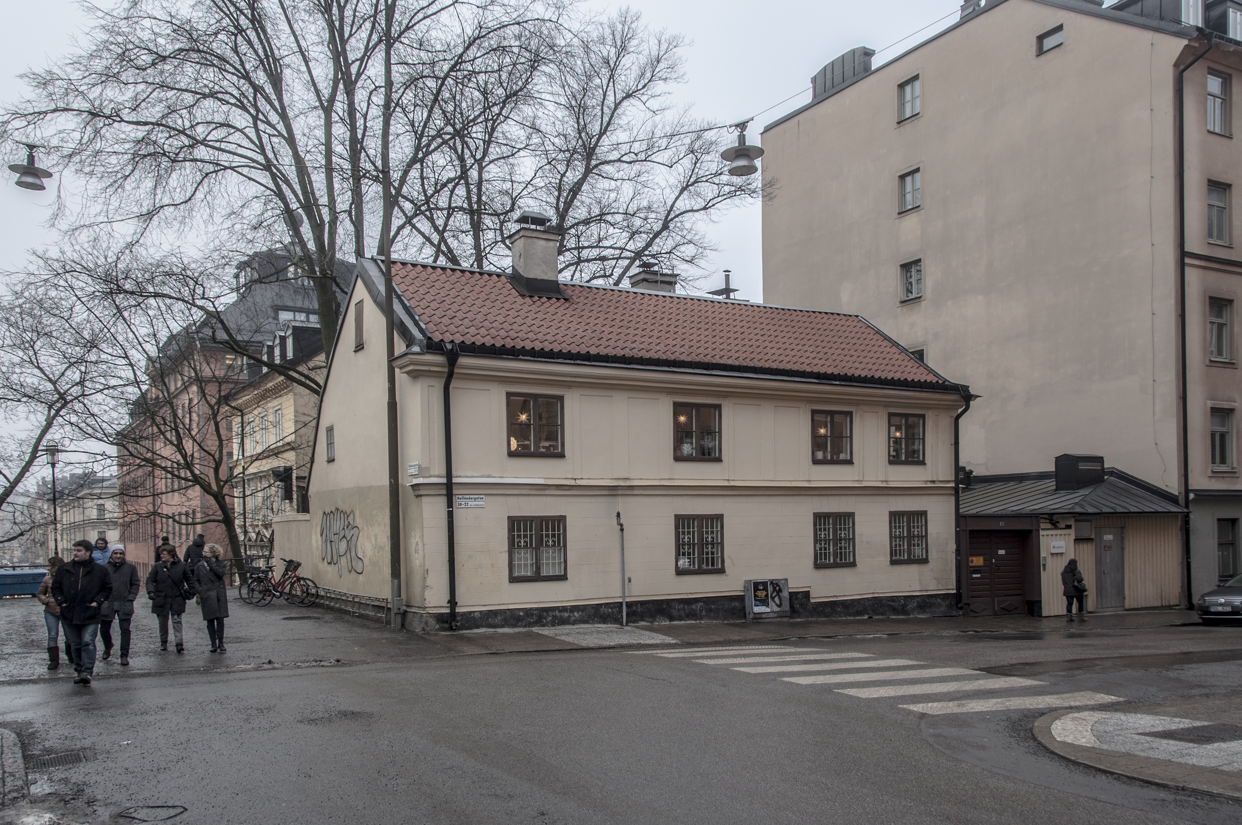 Lindansaren 19, Holländargatan 30, Nybyggnadsår 1750 - 1799